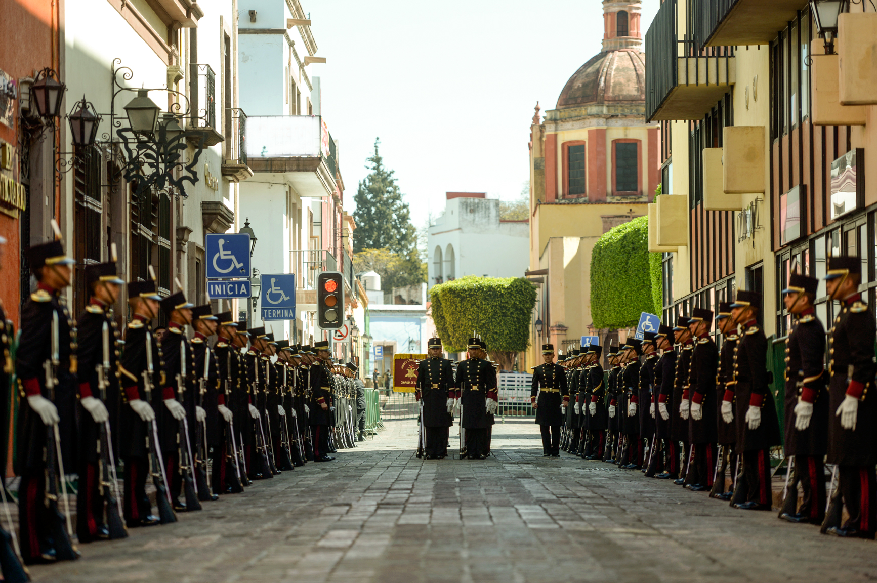 Soldados del Heroico Colegio Militar en la ceremonia del 99 aniversario de la promulgación de la Constitución de 1917 en Santiago de Querétaro.